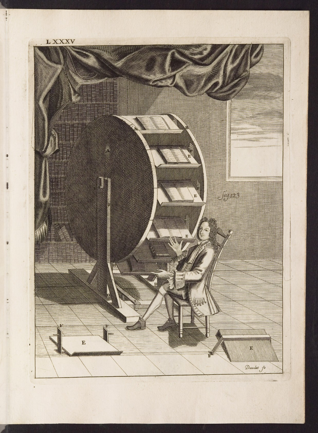 Nicolas Grollier de Serviere's Reading Wheel. Illustration from Recueil d'Ouvrages Curieux de Mathematique et de Mecanique, ou Description du Cabinet de Monsieur Grollier de Serviere 1719